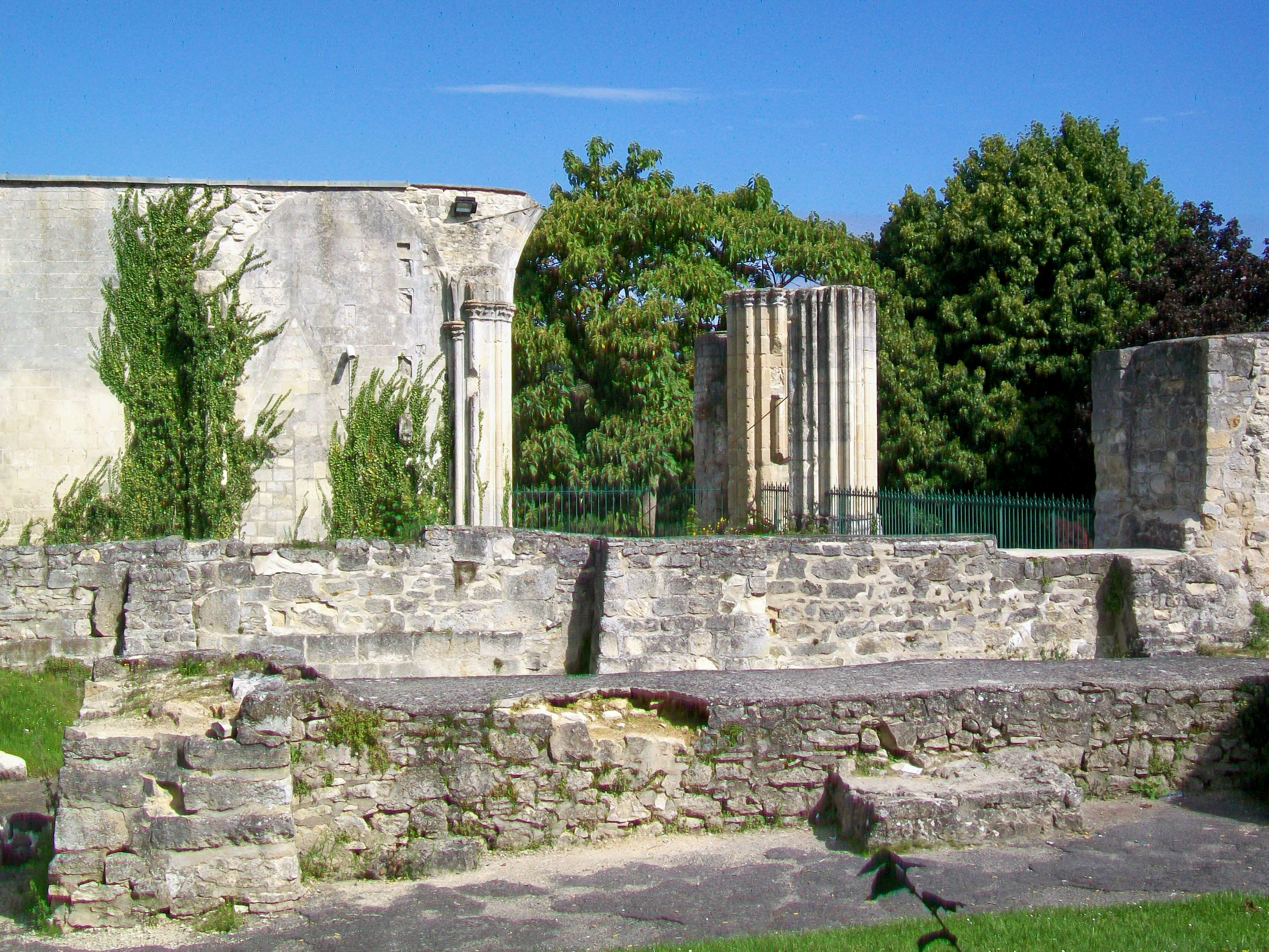 Les ruines de l'église de l'ancien prieuré Saint-Arnoul, place Saint-Simon.